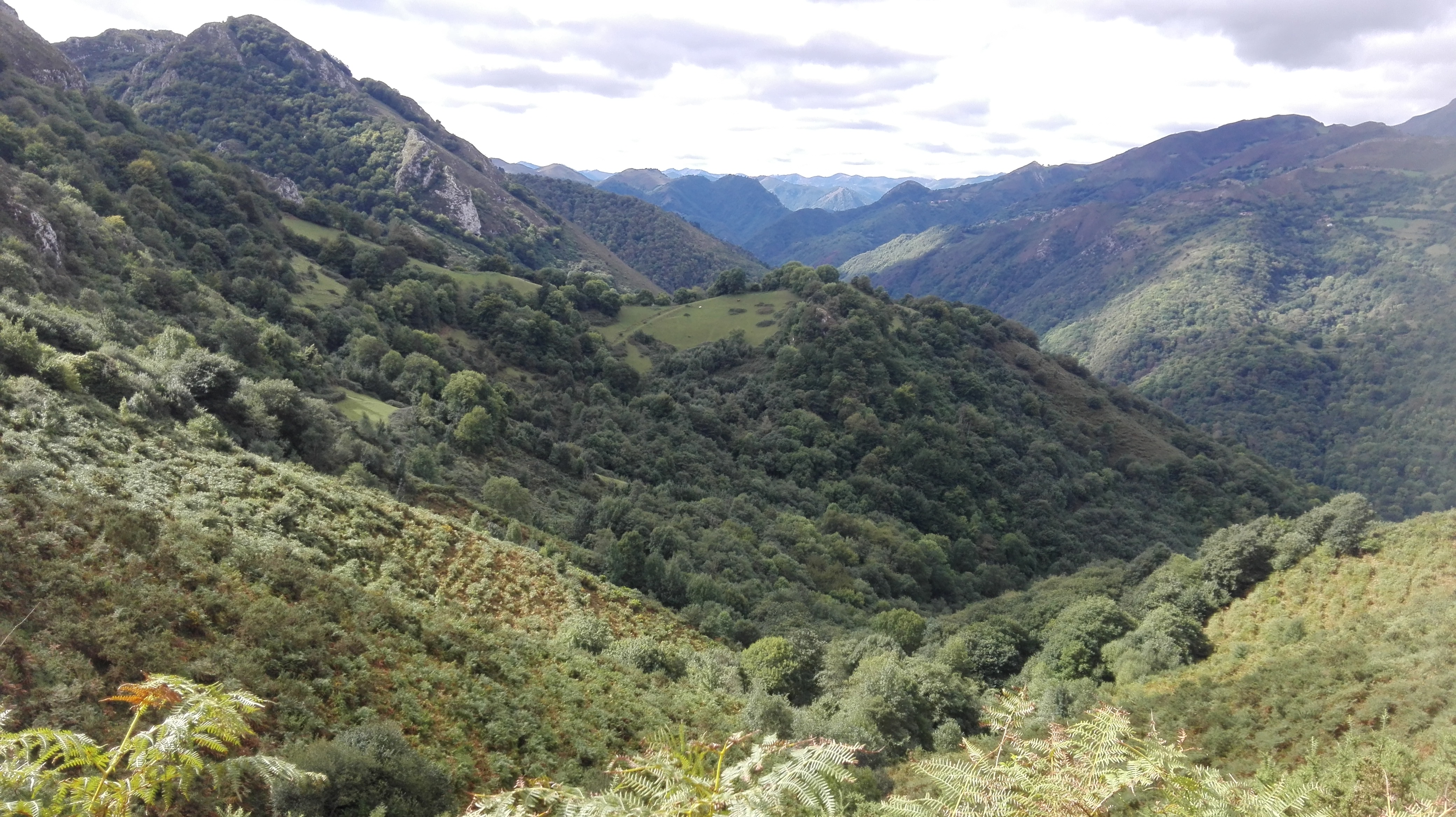 Castru allugáu nel conceyu Miranda